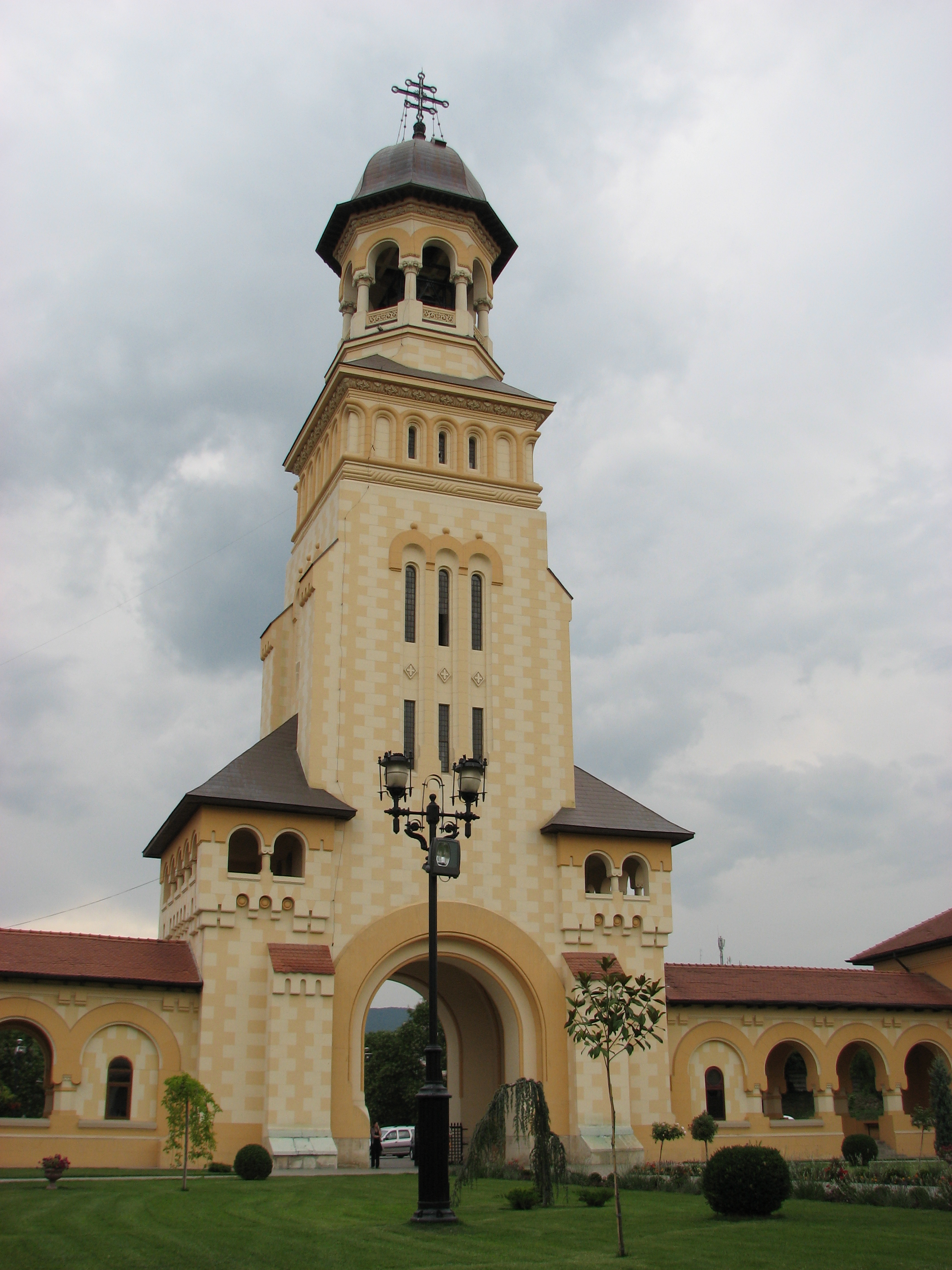 Biserica de Incoronare 02